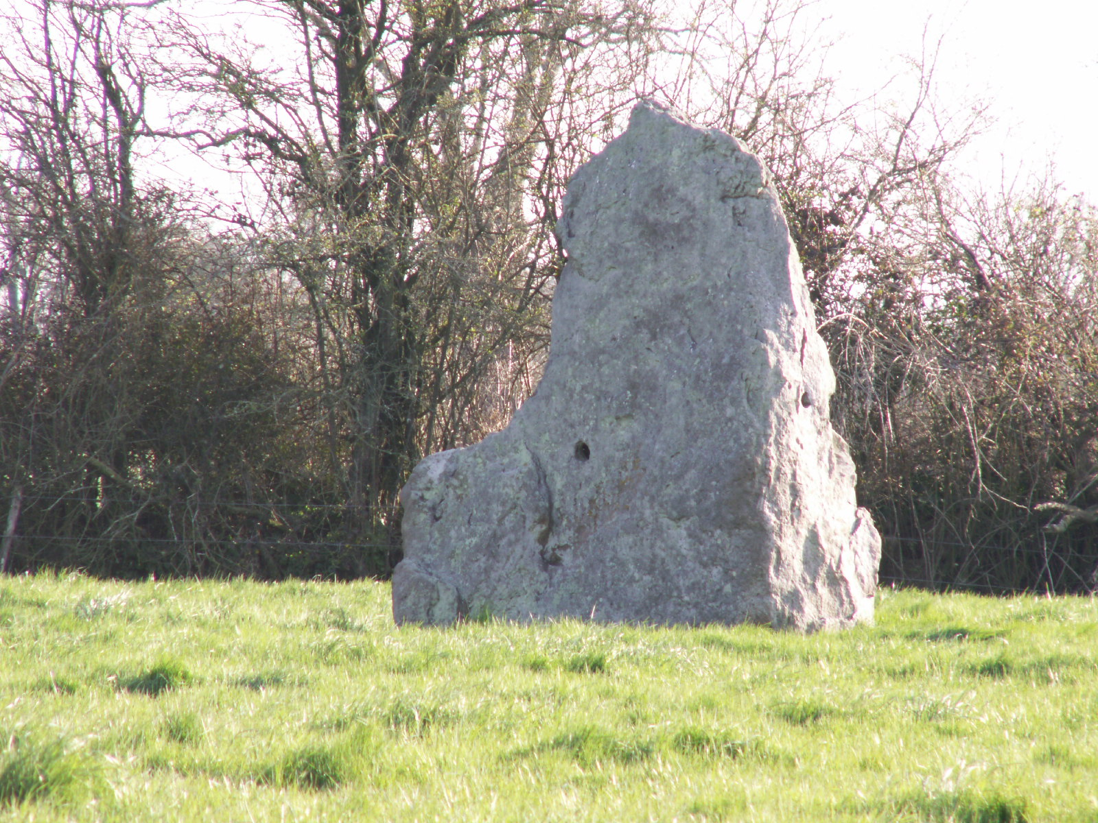 Menhir de la Riveraie, (Inscrit, 1984) .